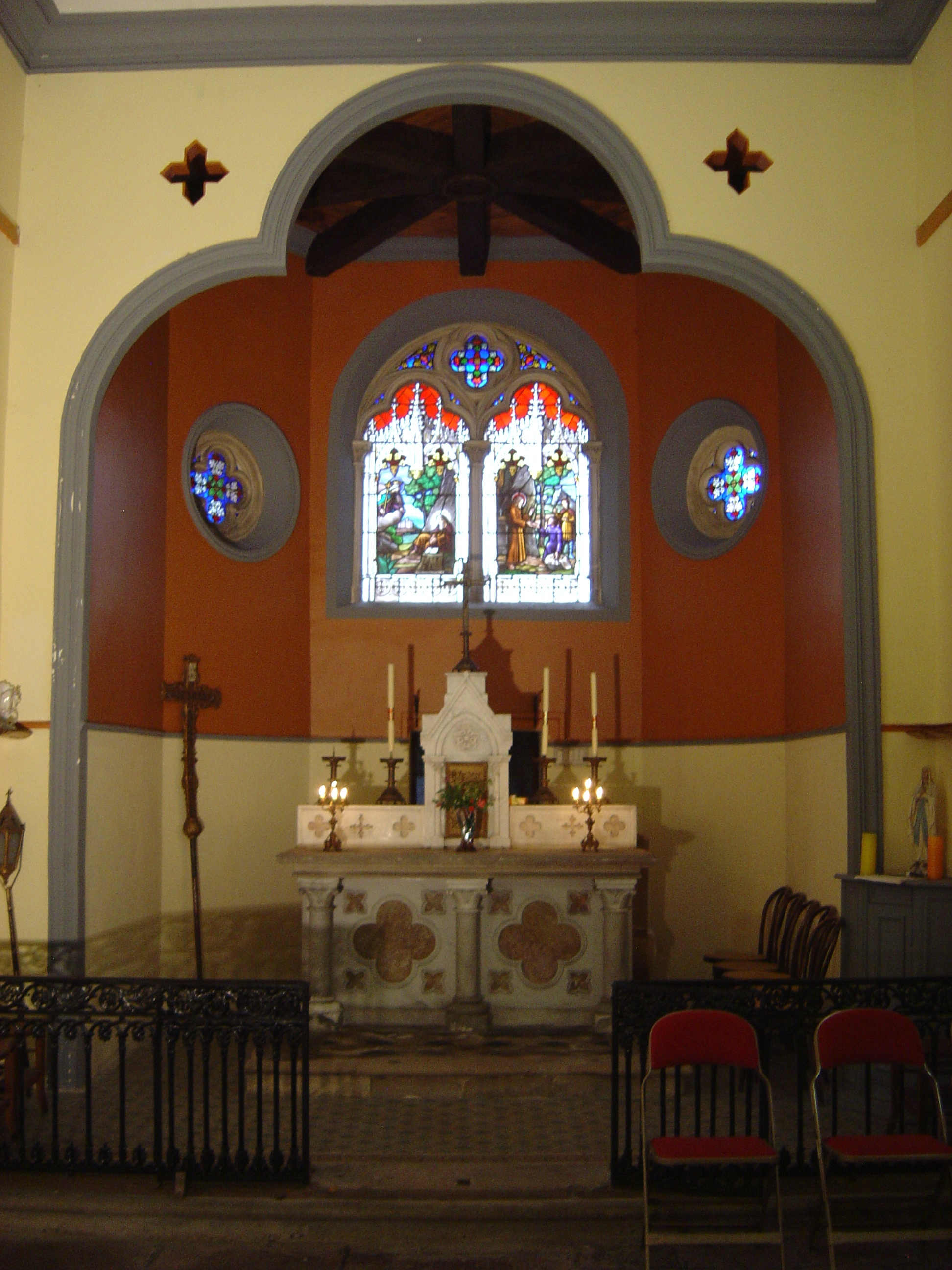 Chœur de la chapelle du Petit-Saint-Dié à Saint-Dié-des-Vosges.